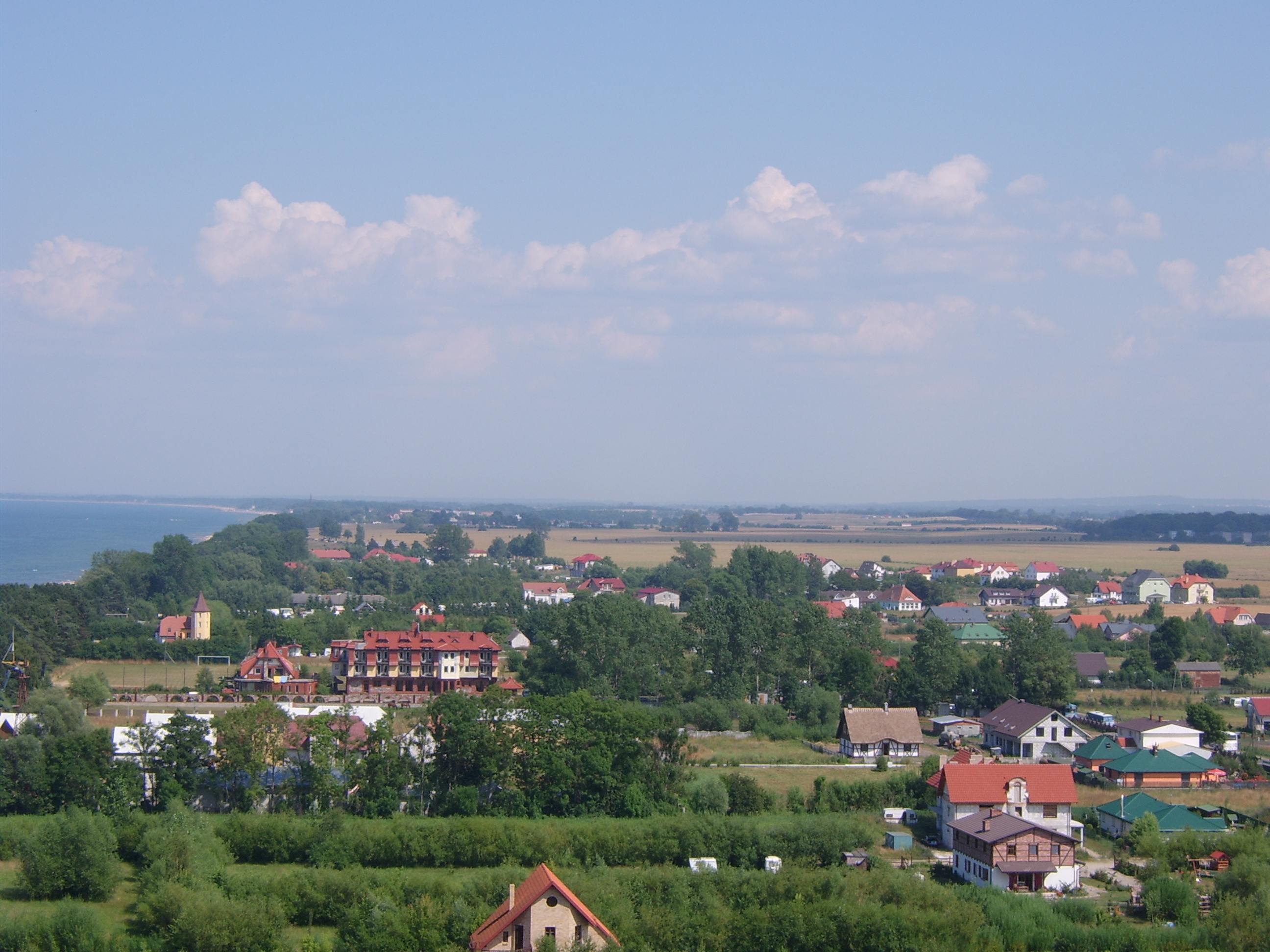 Widok na Gąski ze szczytu latarnii